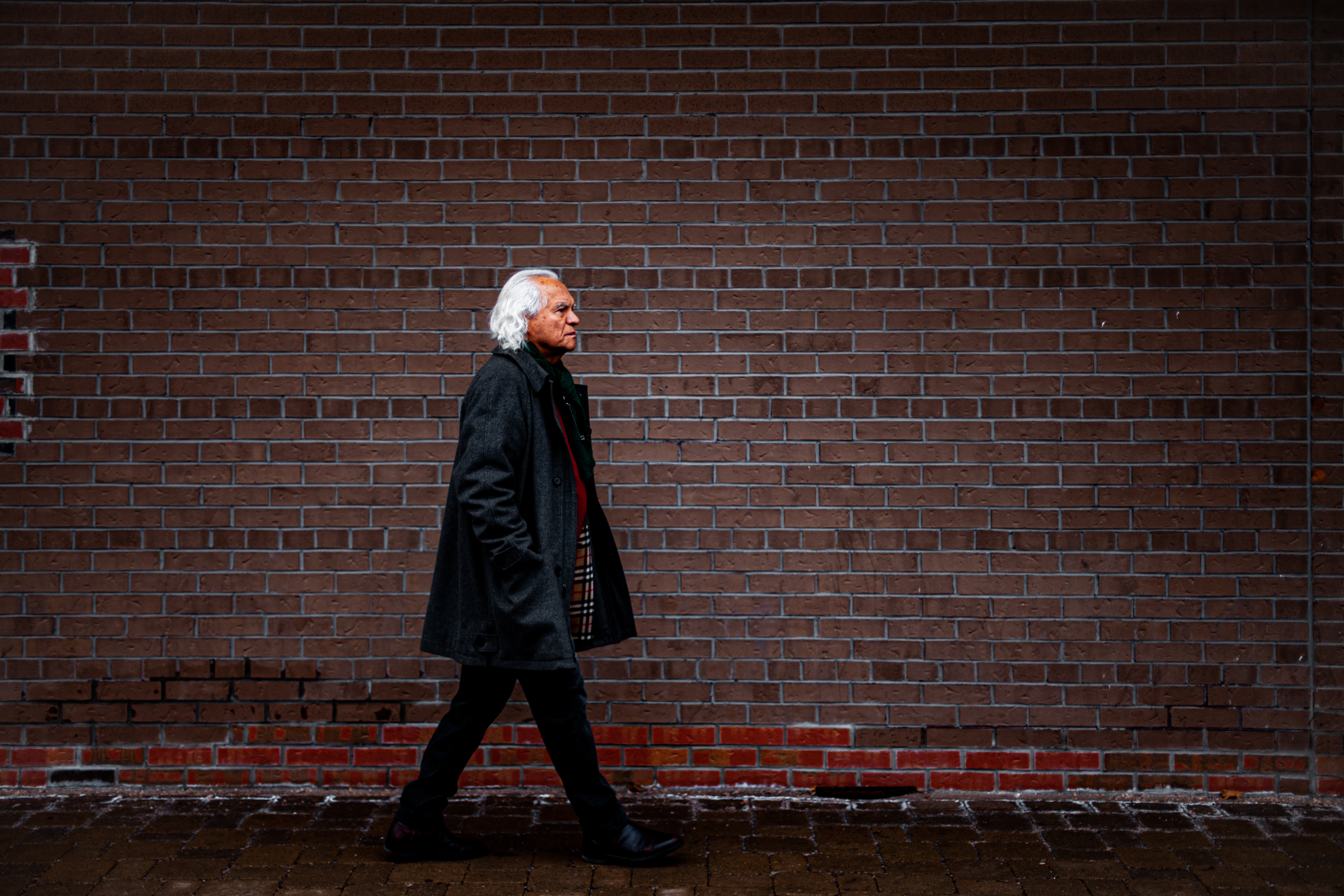 این عکس ها در شهر تورنتو توسط پوریا افخمی ثبت شده است.